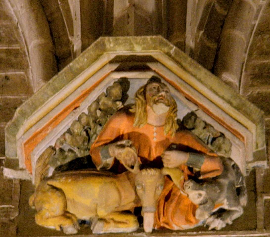 Refectorio de la Catedral de Pamplona